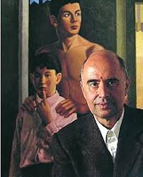 Foto Carlo Bertocci con un suo dipinto